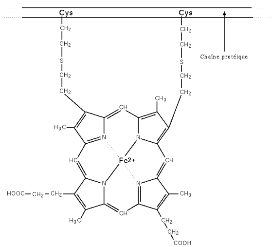 Cytochrome C. avril 2005 Création personnelle. La chaîne protéique est consituée de 104 acides aminés. Cys = cystéine.